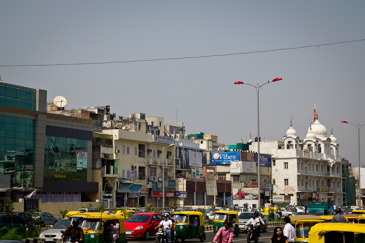 delhi, india